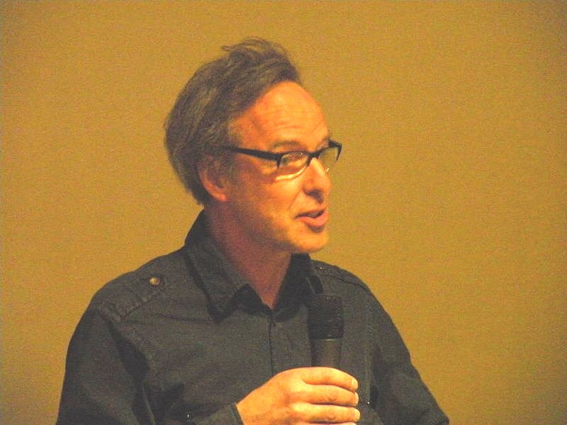 Hermann Kaufmann, architecte autrichien, lors d’une conférence à Rennes.